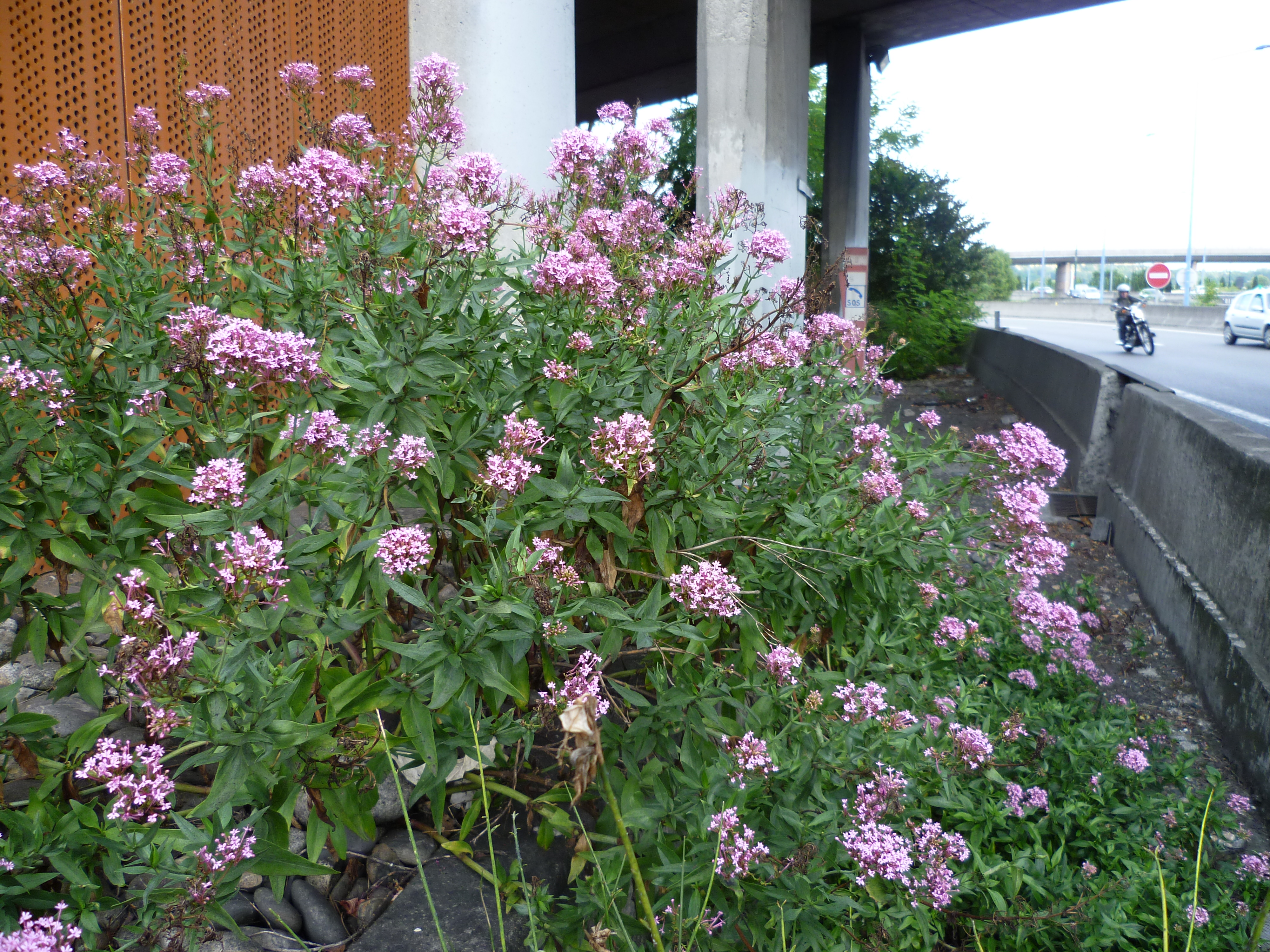 Toulouse (Haute-Garonne, France) : Centranthus ruber sauvages au bord du périphérique.